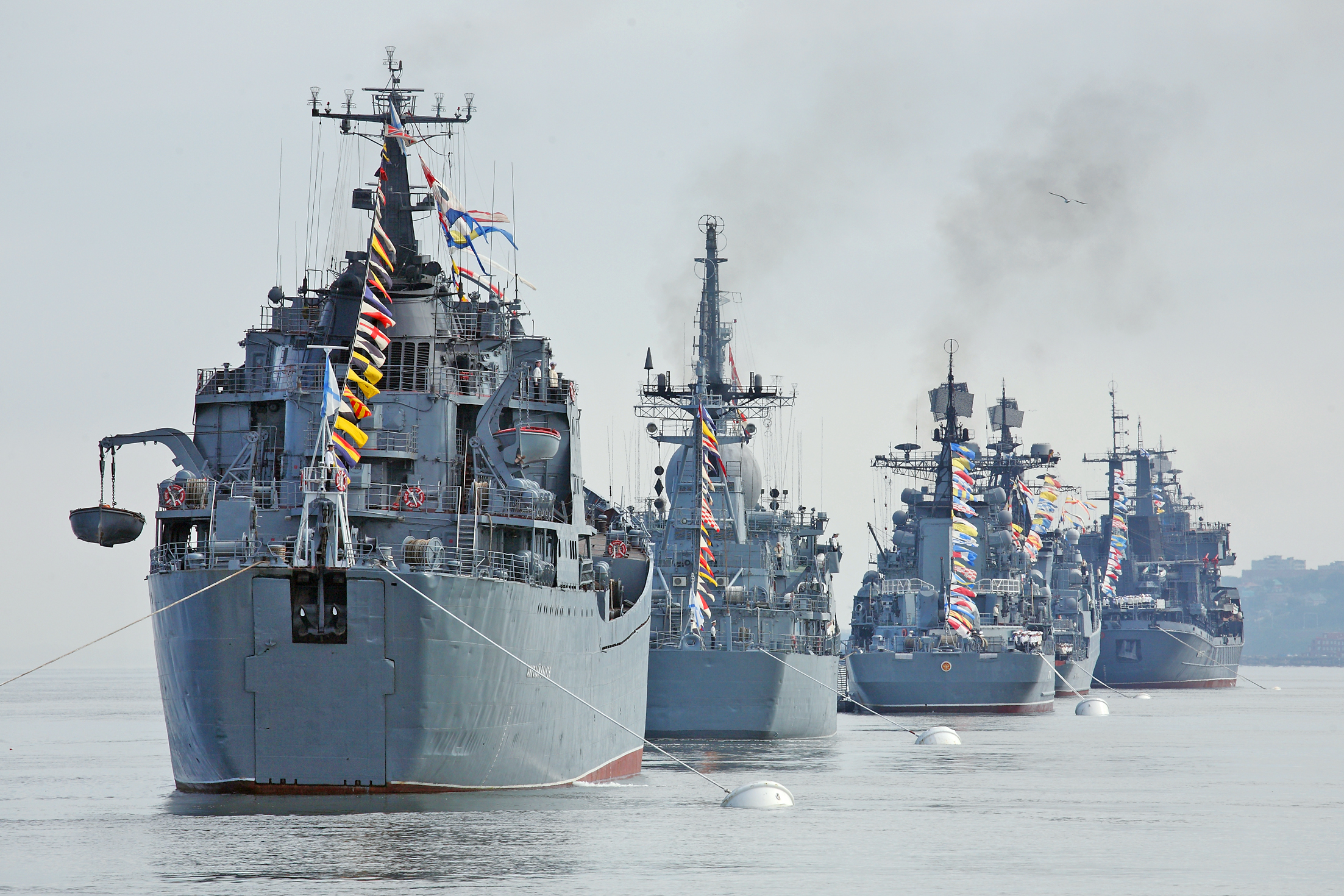 Парад кораблей на день ВМФ 2009 года, Владивосток